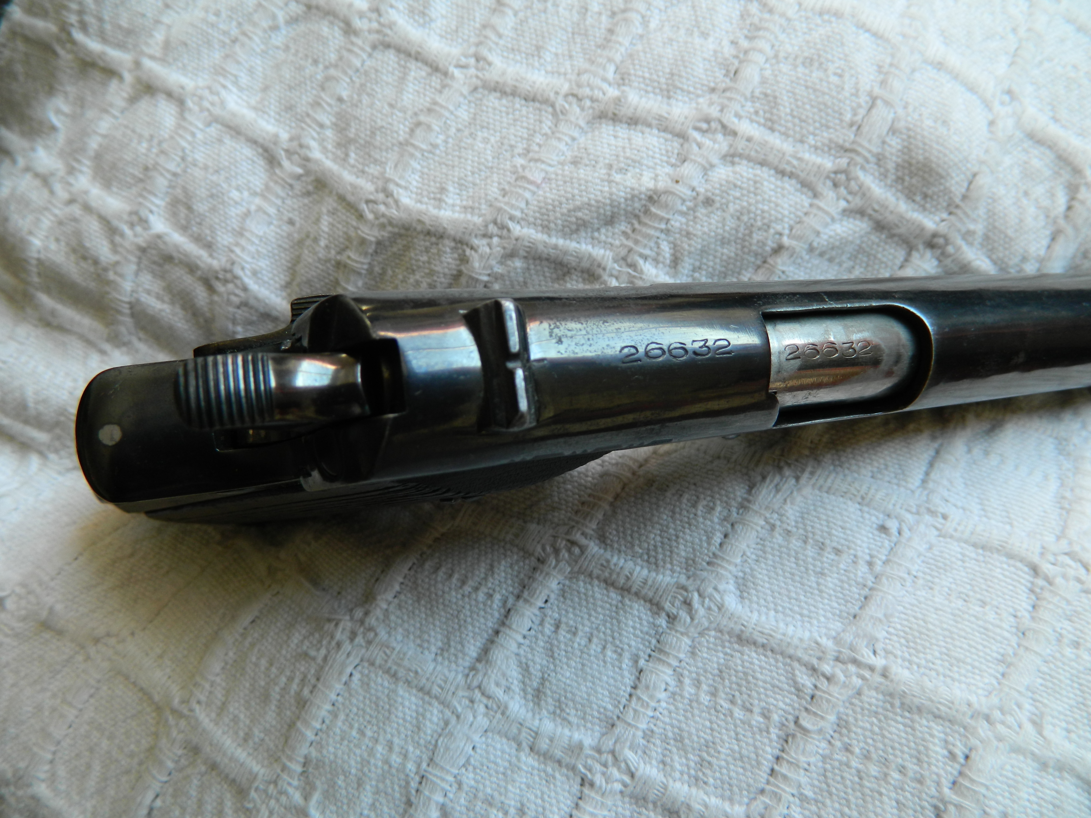 Número de serie grabado en una pistola semiautomática Ballester Molina.